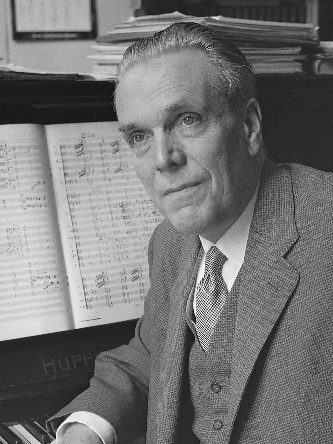 Oscar van Hemel wordt 3 augustus 70 jaar, opdracht Telegraaf 2 augustus 1962